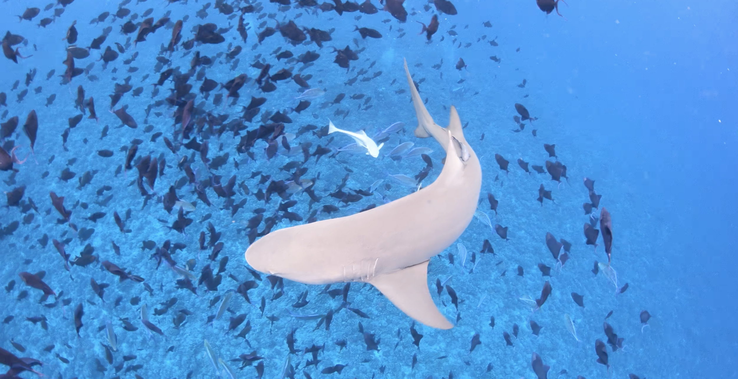 Requin gris pris non loin des requin citron à Moorea